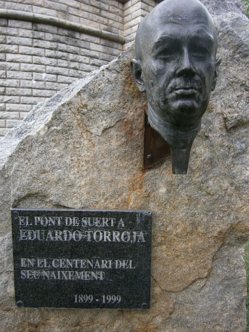 Monument a Eduard Torroja, en el centenari del seu naixement, situat a El pont de Suert